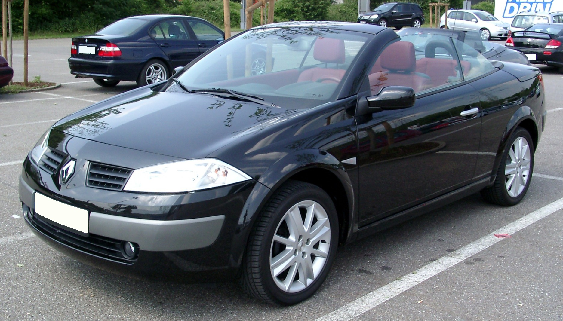 Renault Mégane CC